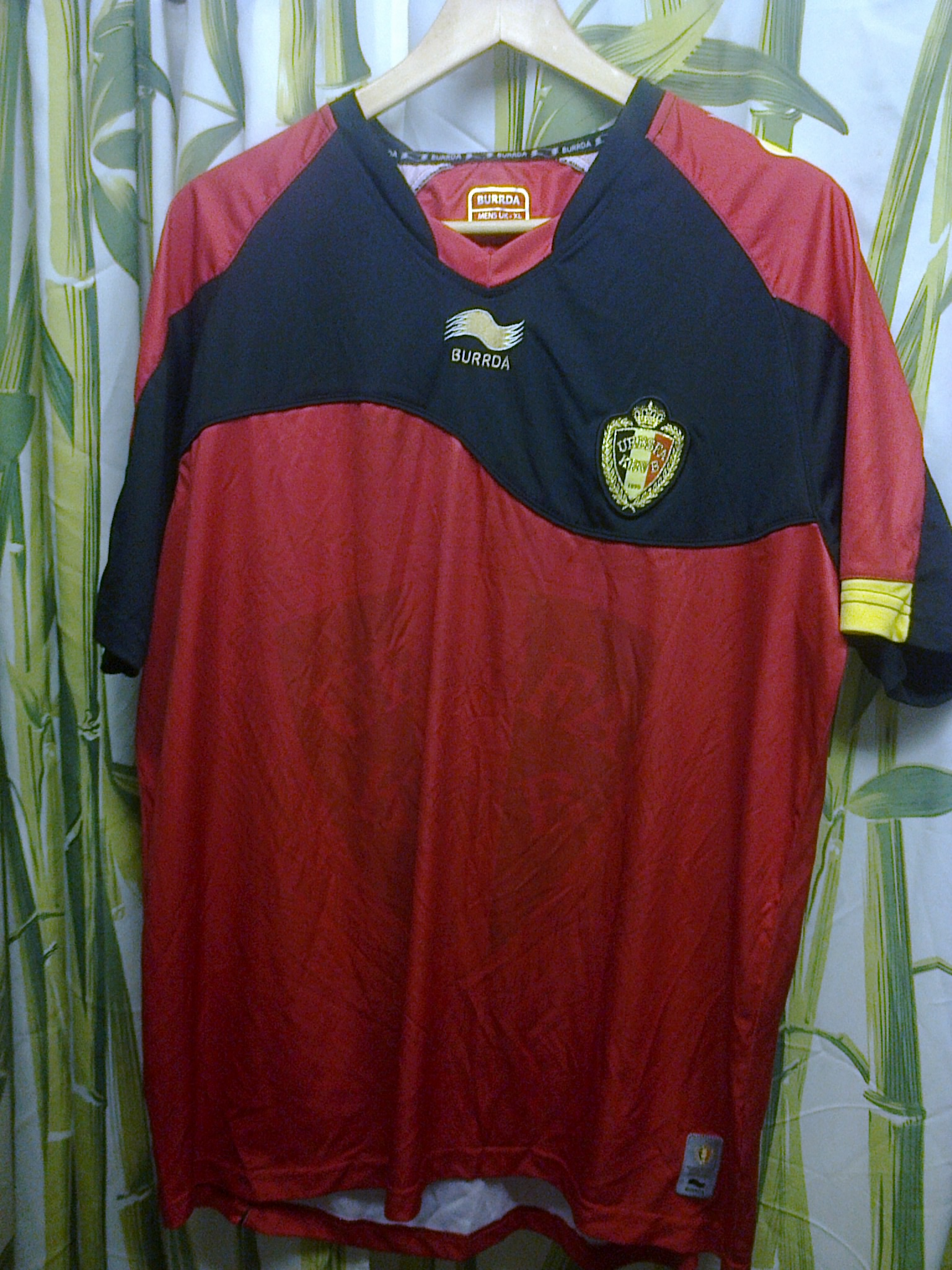 Maillot Burrda de l'équipe nationale de Belgique en 2010 et 2011